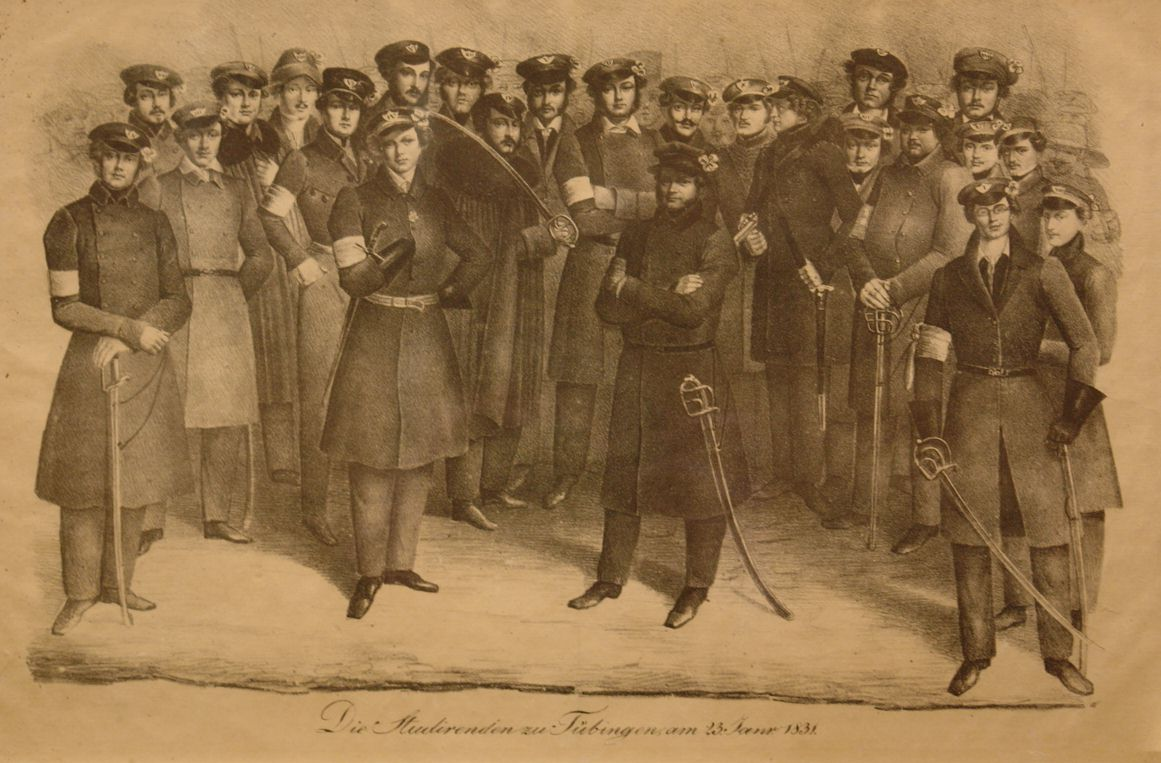 Die Anführer der studentischen Sicherheitswache zu Tübingen mit ihrem Befehlshaber, dem Prokurator und ehemaligen Obersten Kübel, am 23. Januar 1831. (Kreidelithographie)